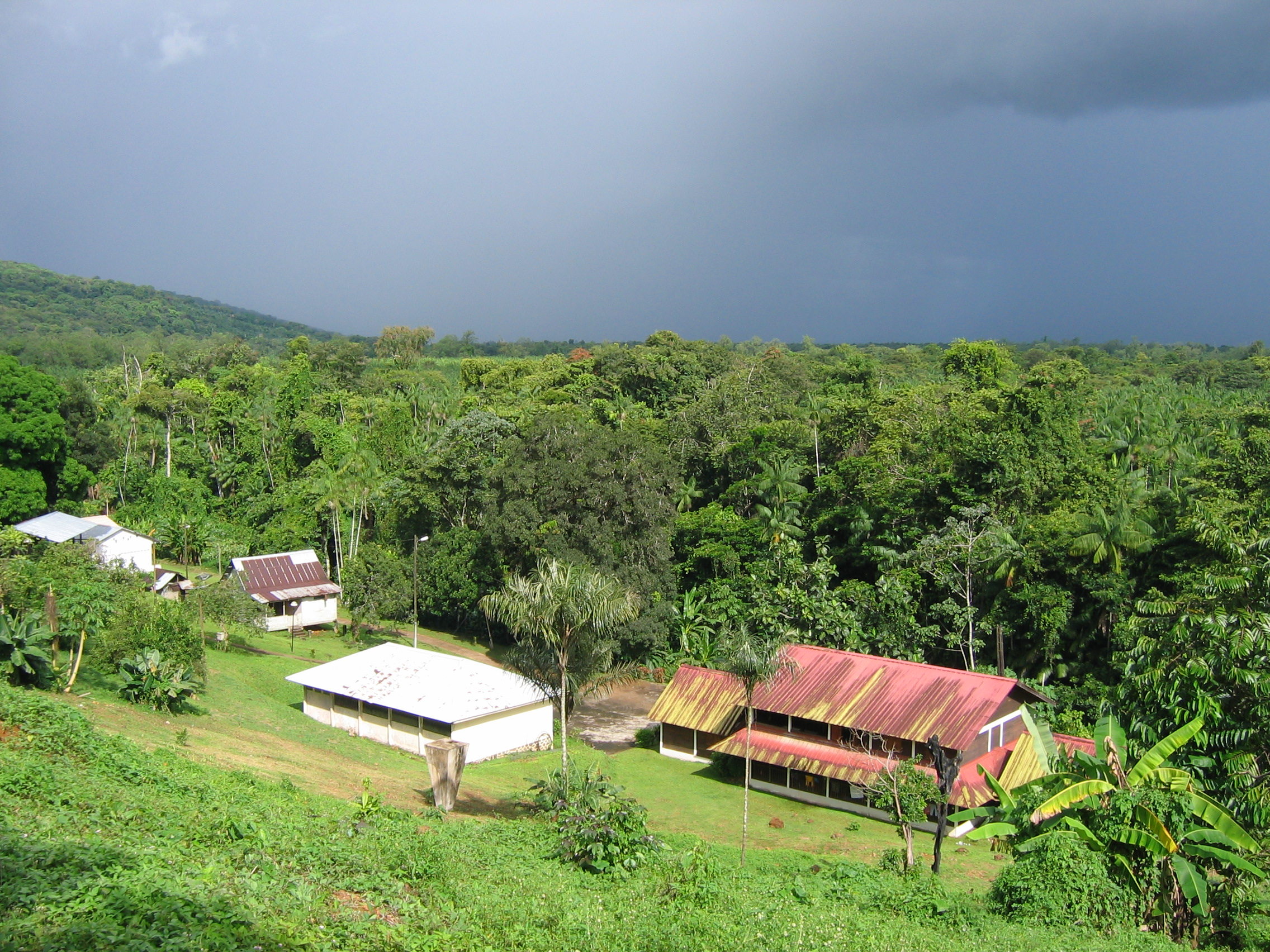 Vue de Ouanary à partir de la piste agricole